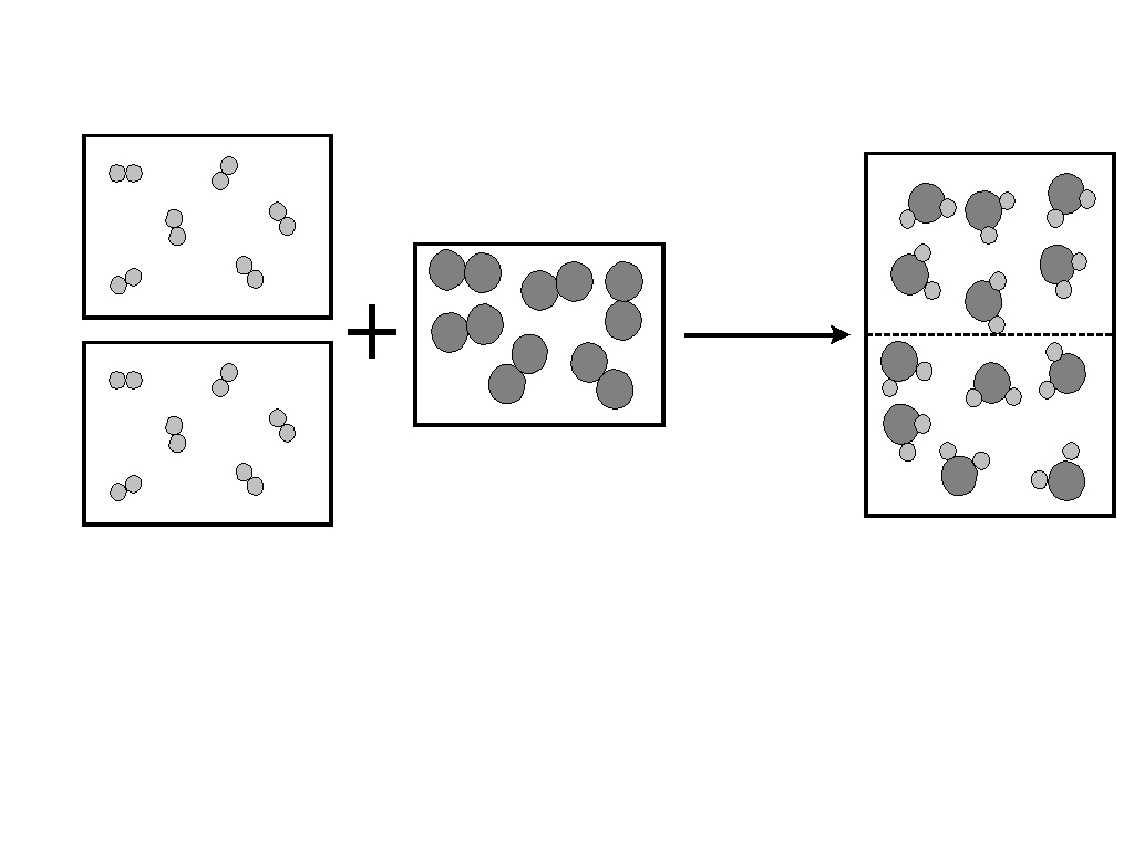 esquema reacción quimica en fase gaseosa (ej. H2O)